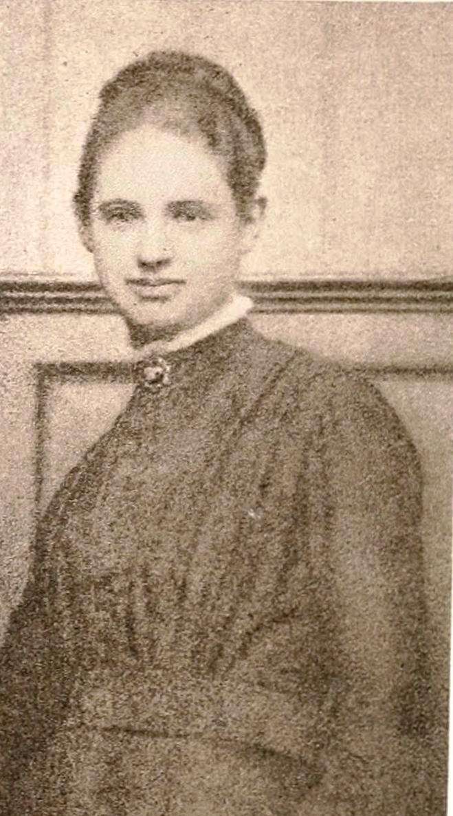 מארי אליזבת קולרידג' בגיל 22.